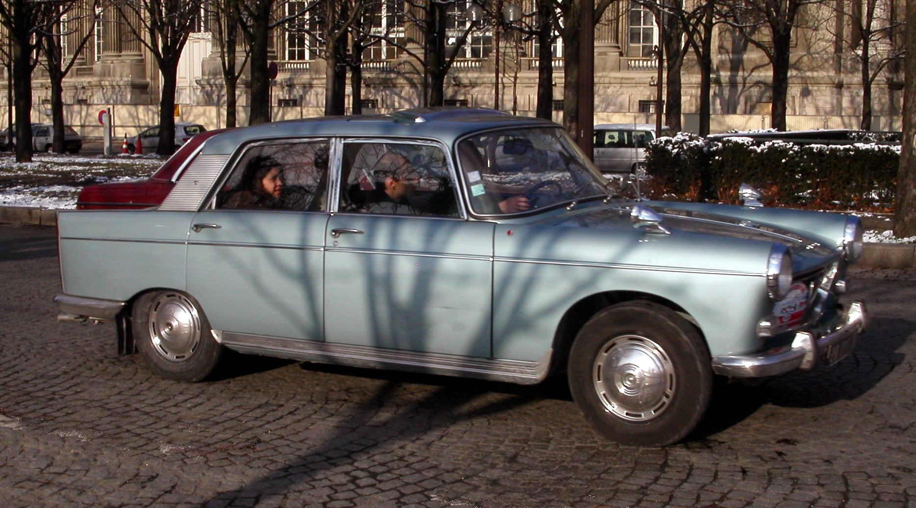 Peugeot 404 lors d'un défilé dans Paris.